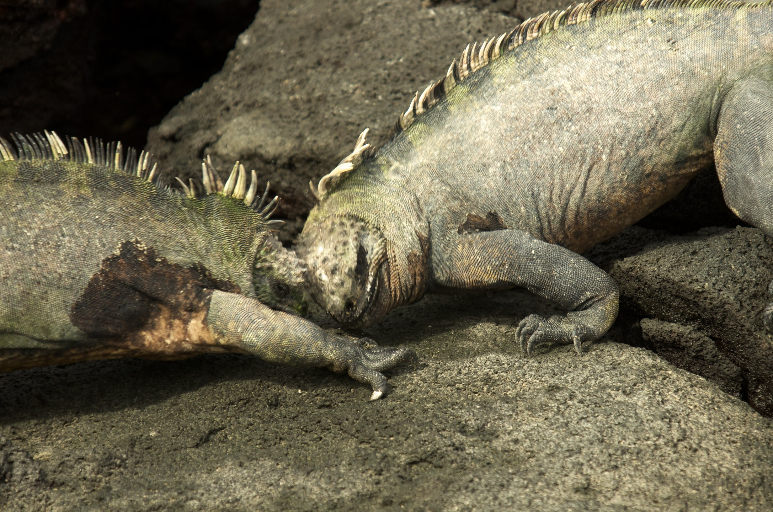 Punta Espinosa, Fernandina Island, Galapagos, Ecuador